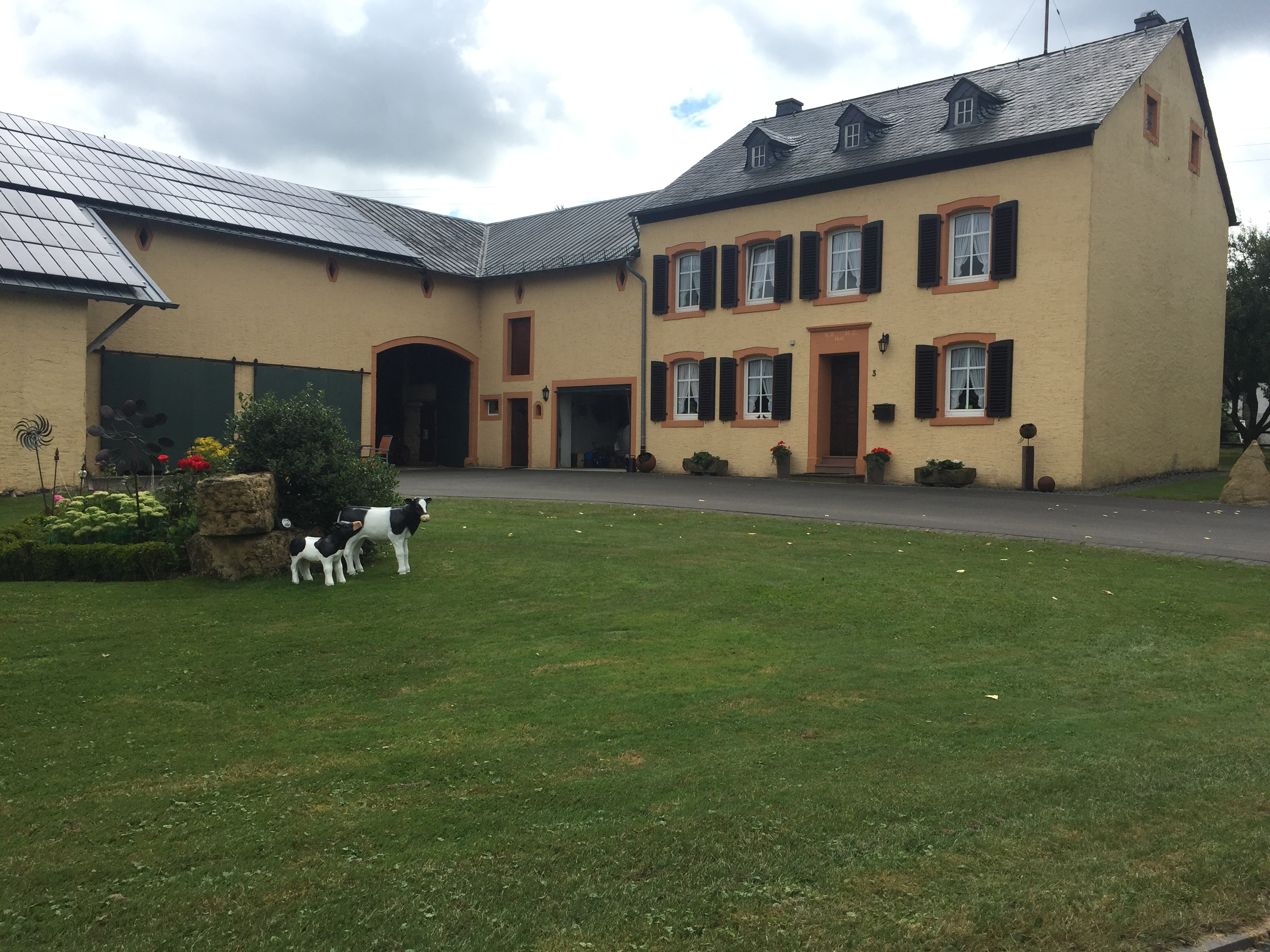 Típica granja alemana en Kruchten.